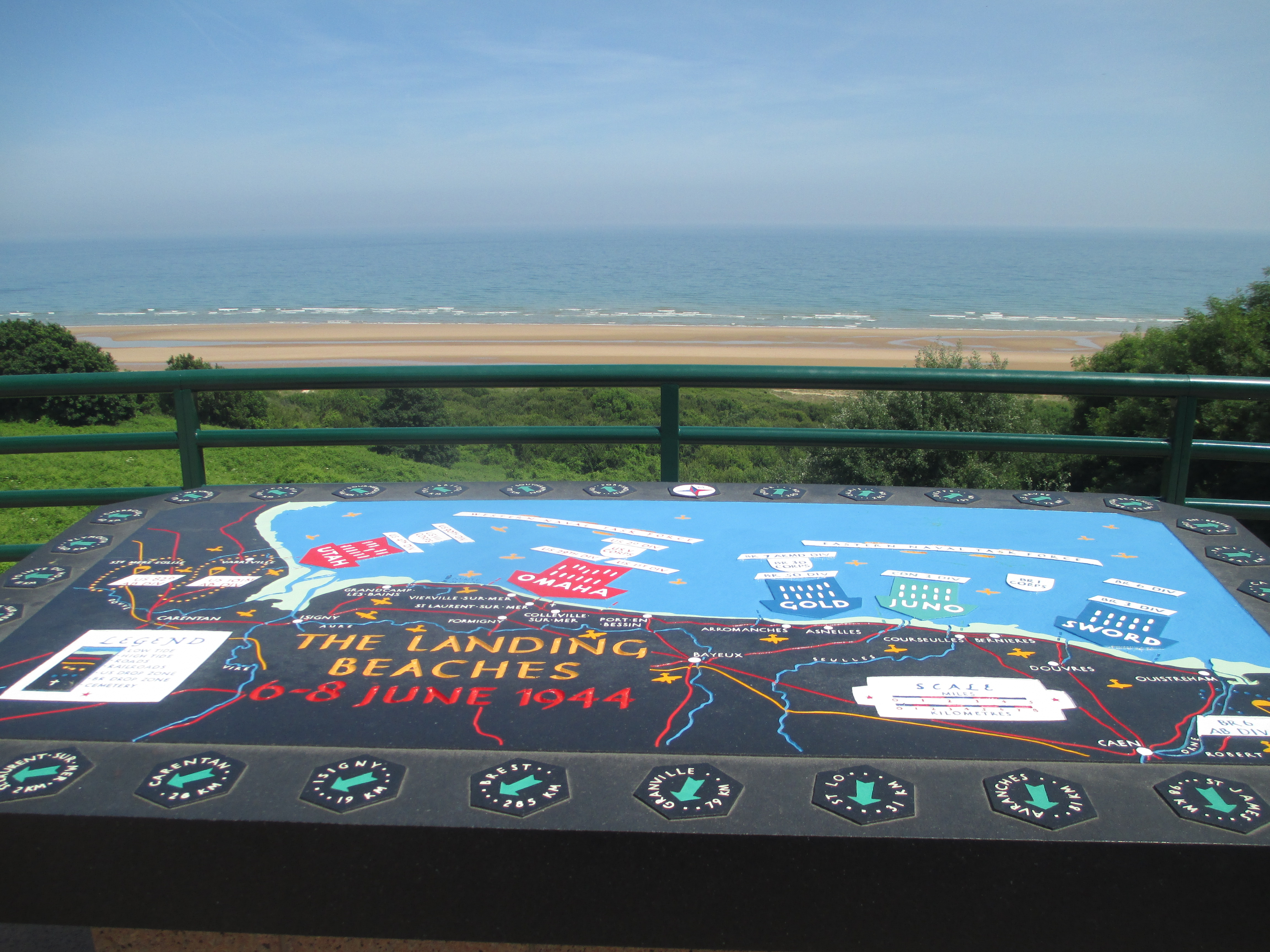 מבט על חוף אומהה מבית הקברות האמריקאי בנומנדי